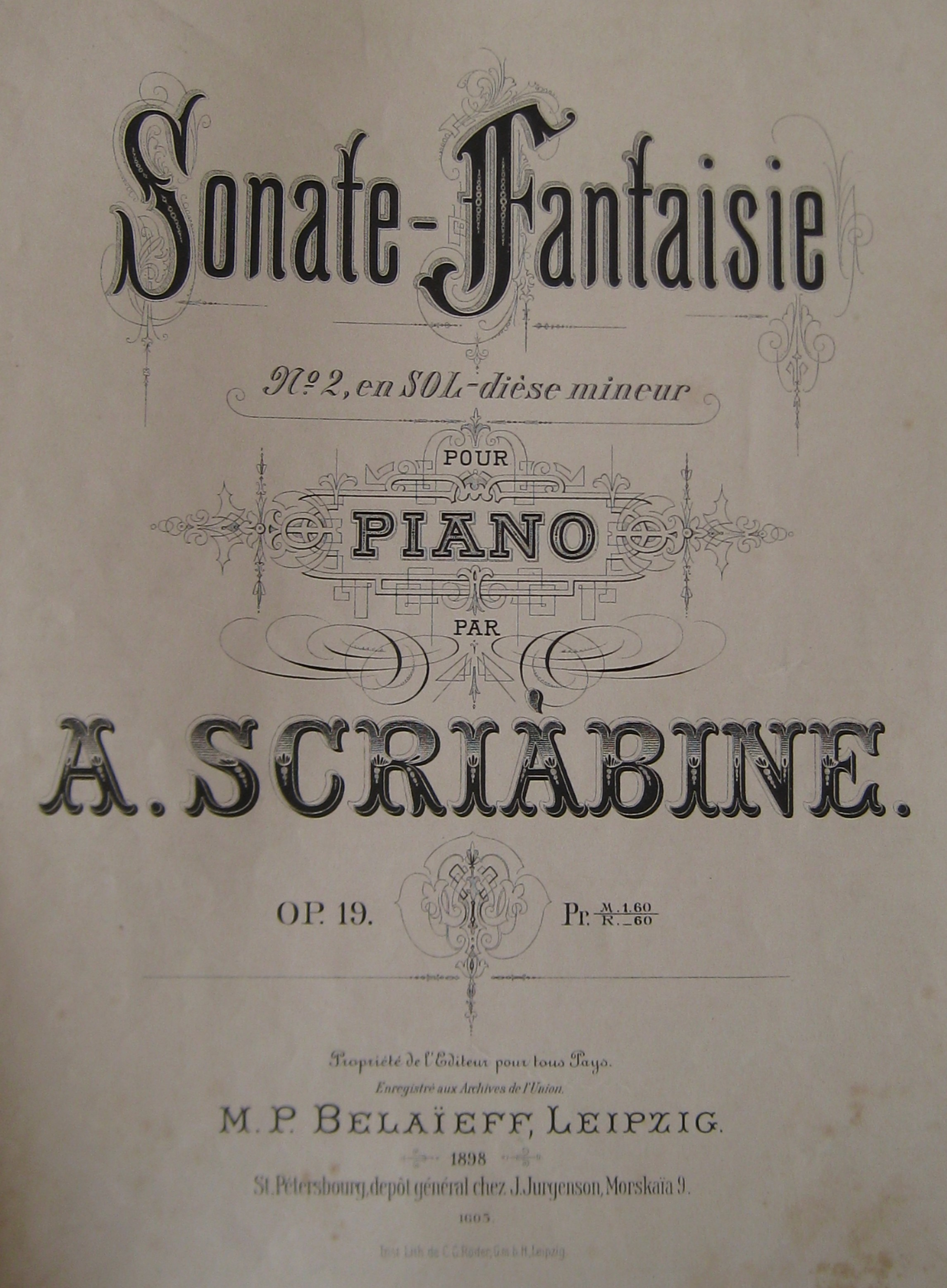 Original Erstausgabe